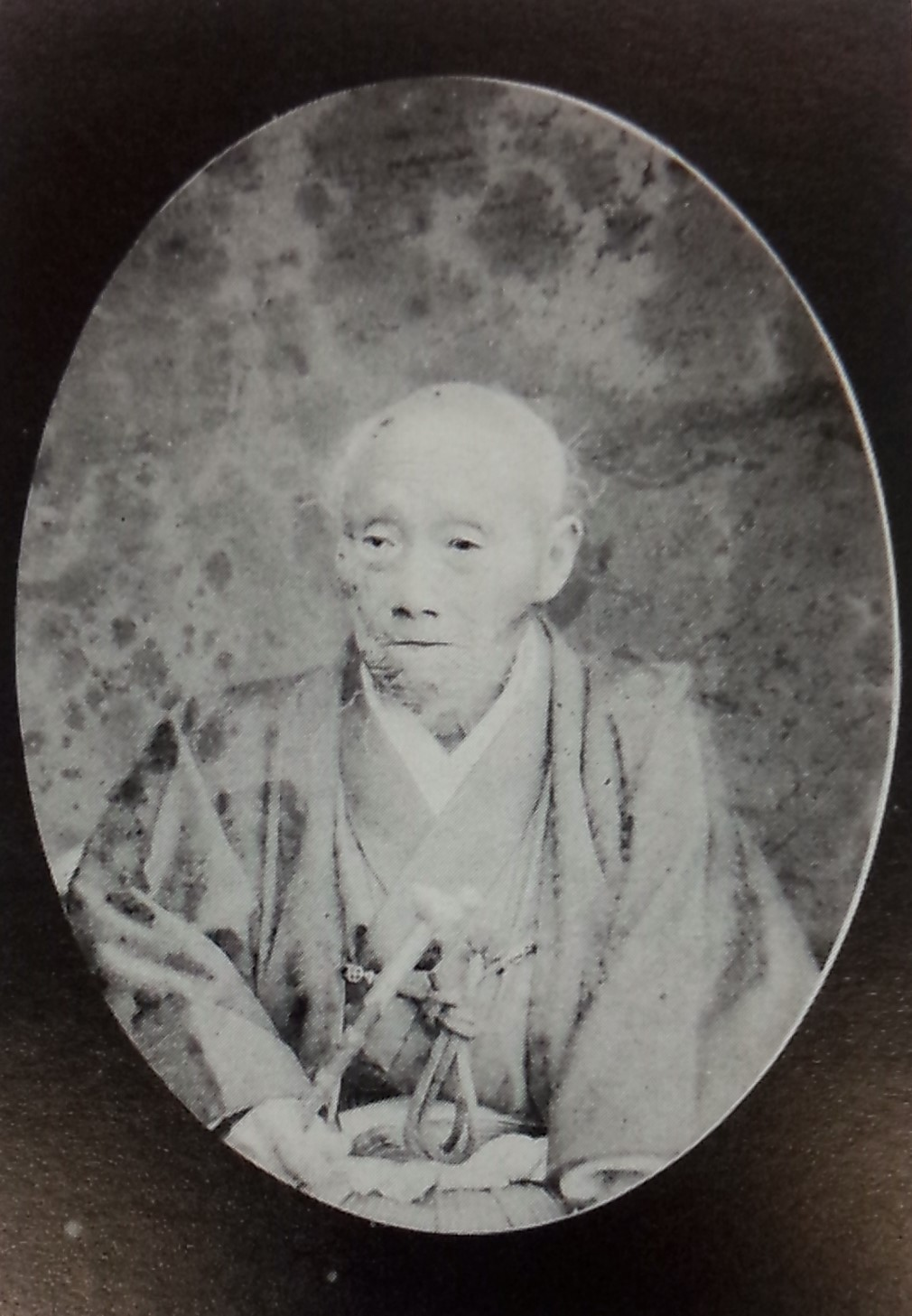 綾小路有長の肖像写真。